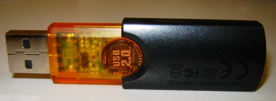 Memoria USB sony 2.0 512 MB